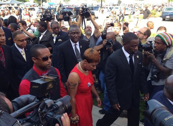 2014'te ABD'nin Ferguson kentinde vurulan Michael Brown'ı anma töreninden bir görüntü. Kırmızı elbiseli kadın vurulan gencin annesi Lesley McSpadden.